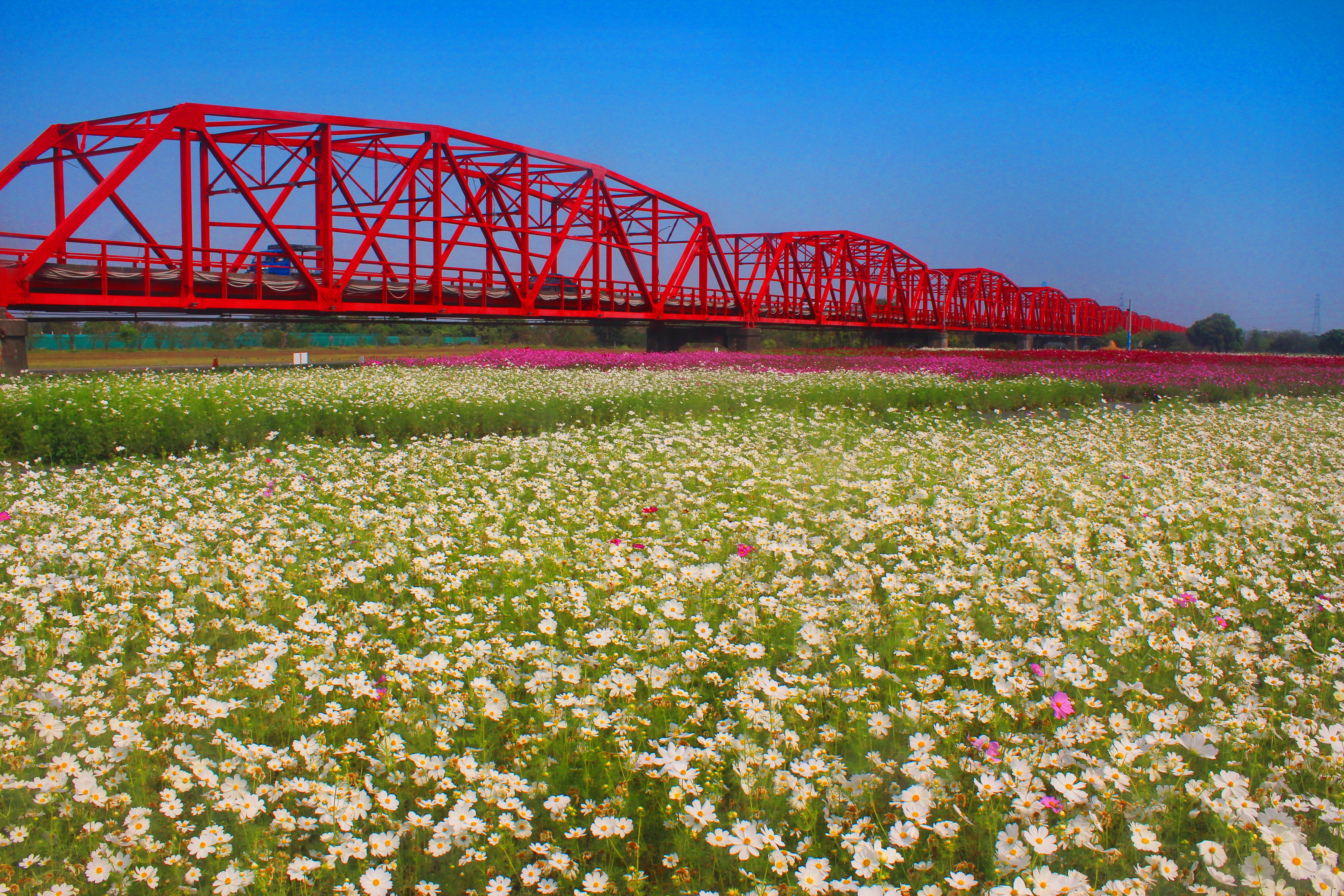 西螺大橋橫跨濁水溪下游，以華倫式桁架橋設計， 1952年完工時，西螺大橋是僅次於美國舊金山金門大橋的世界第二大橋，也是當時全台灣最長的橋樑，被譽為「遠東第一大橋」。